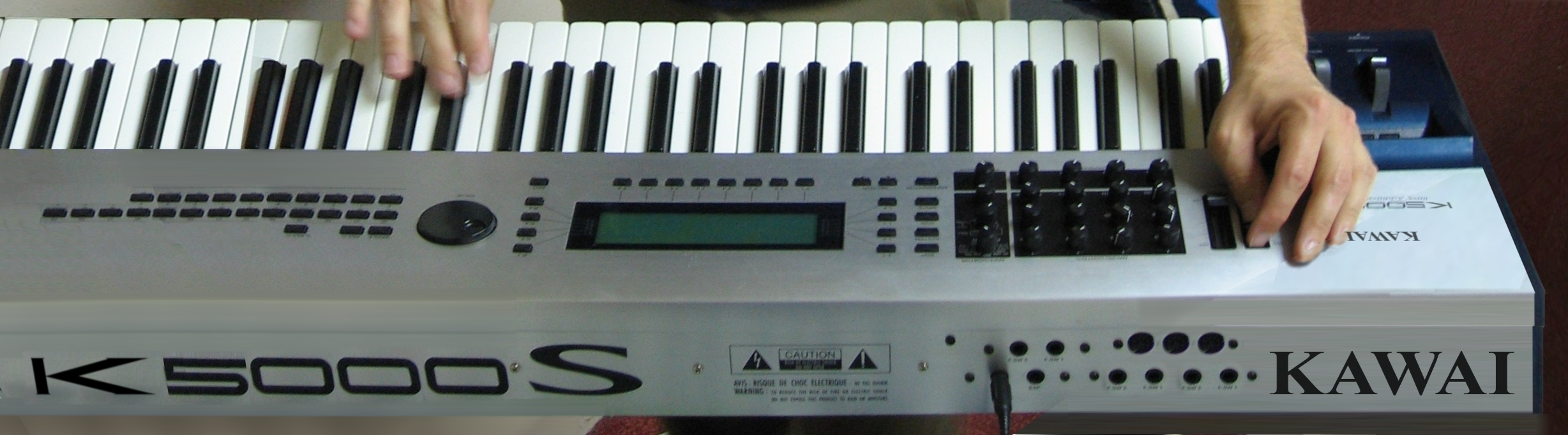 Keyboard Musician Kawai K5000S